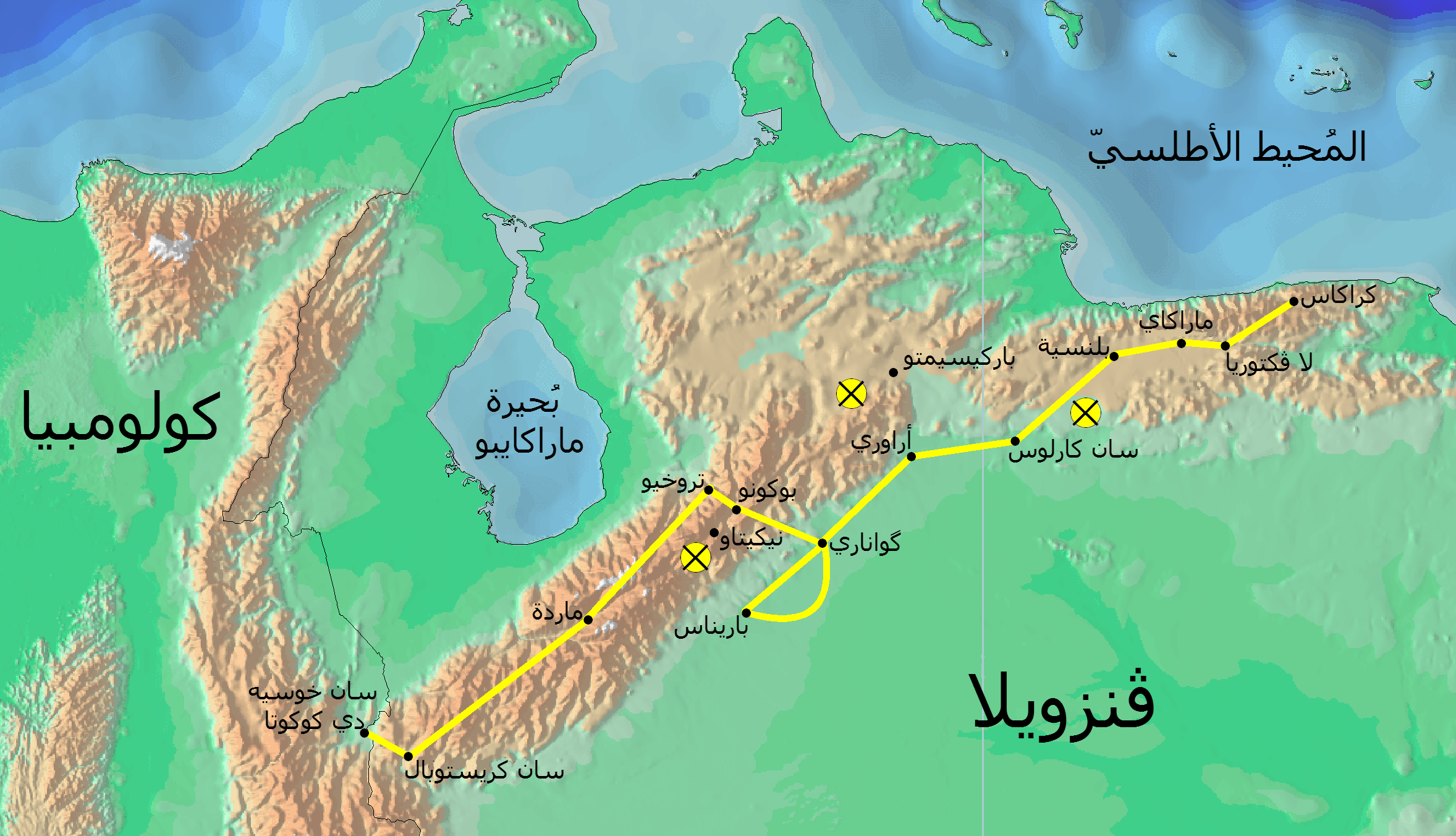 مسار الحملة الأدميربالي أو الحملة المُثيرة للإعجاب، التي جرت أحداثُها في 14 أيَّار (مايو) 1813، والتي تُعد واحدة من أشهر حملات سيمون بوليڤار العسكريَّة ضمن حرب استقلال ڤنزويلا.